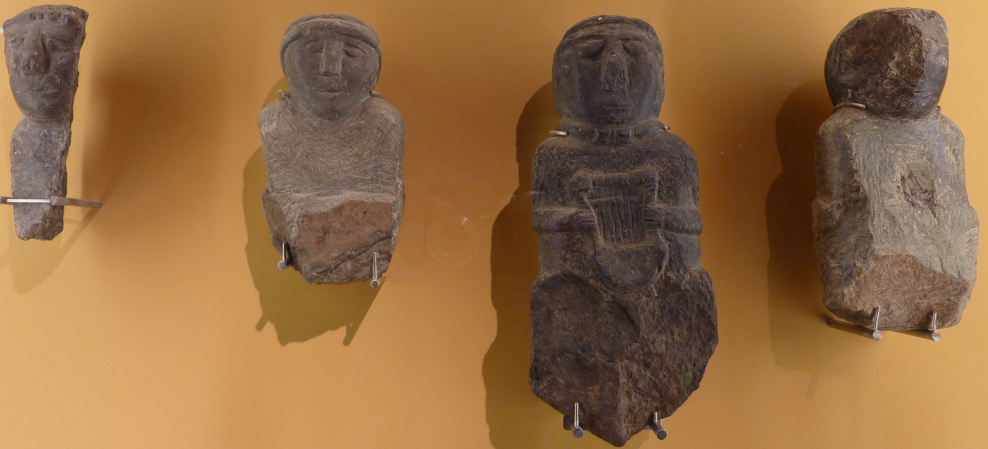 Paule (Côtes-d'Armor) : statues du second âge du fer (enfouies vers la fin du 2ème siècle avant J.-C. ; le hiératisme des visages fait penser à des figurations de défunts. Le personnage au torque et à la lyre serait peut-être la représentation d'un barde (Musée de Bretagne, Rennes)